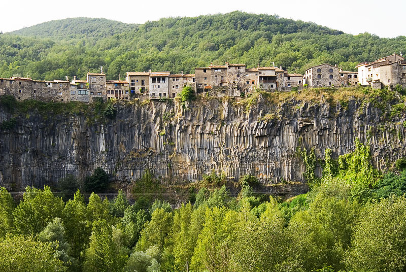 Vista general centrada de Castellfollit de la Roca